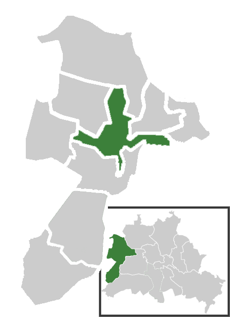 Lage des Ortsteil Spandau im Berliner Bezirk Spandau